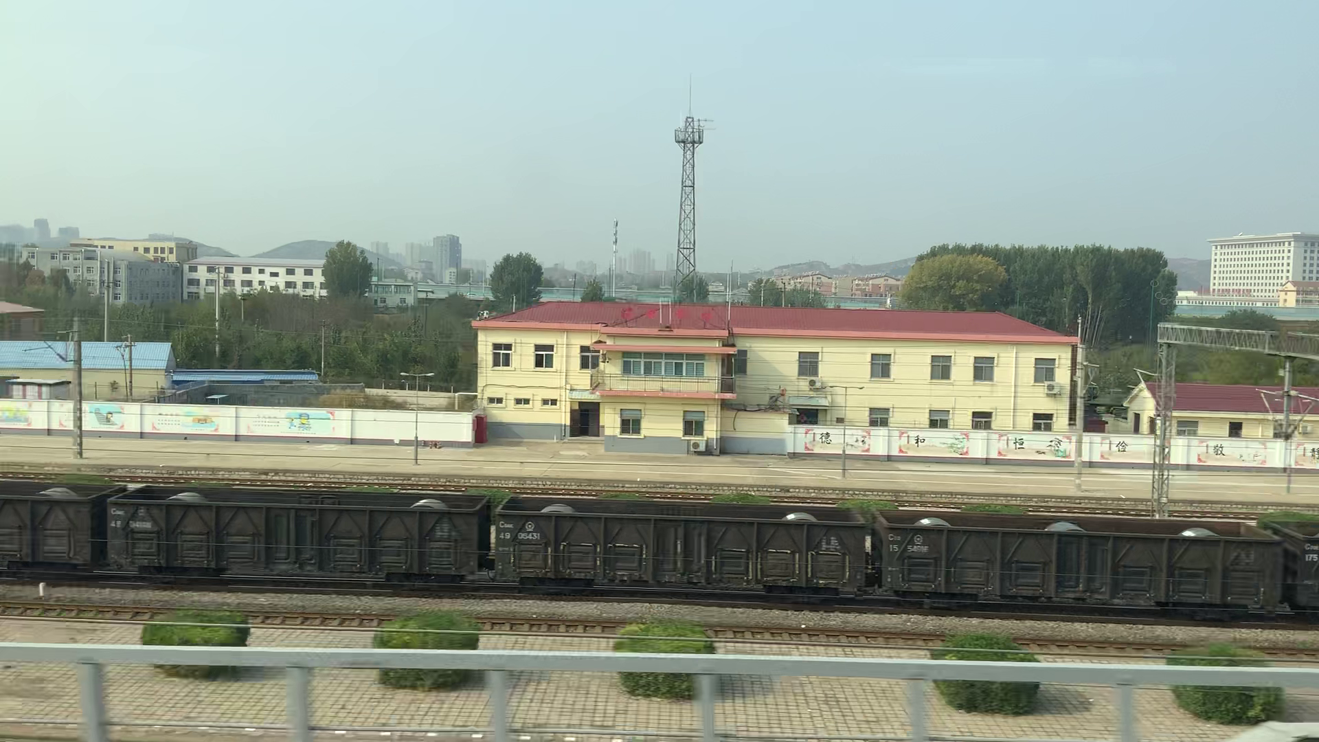 济南南站站台